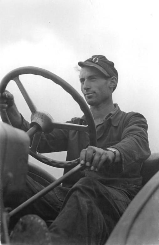 Isseroda, Traktorist der MTS Zentralbild Wittig 13.8.1953 Erntearbeiten der MTS Isseroda, Kreis Weimar Bei der Einbringung der diesjährigen Friedensernte vollbringen die Traktoristen der Maschinen-Traktoren-Stationen vorbildliche Leistungen. Der Traktorist Lorenz von der MTS Isseroda, Kreis Weimar, erreichte eine Tageshöchstleistung von 8, 5 ha beim Binden. Diese Tagesleistung verteilt sich auf 10 verschiedene Felder bei einer 11 1-2- stündigen Arbeitszeit einschließlich Rüstzeit. UBz: Den Traktoristen Lorenz auf seinem Traktor.